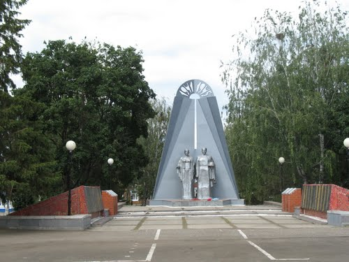 гевг5вгвегвг5вгв